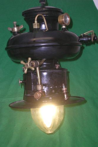 Hängeleuchte Petromax 834, Petroleum-Starklicht Hängelampe aus den 1930er Jahren